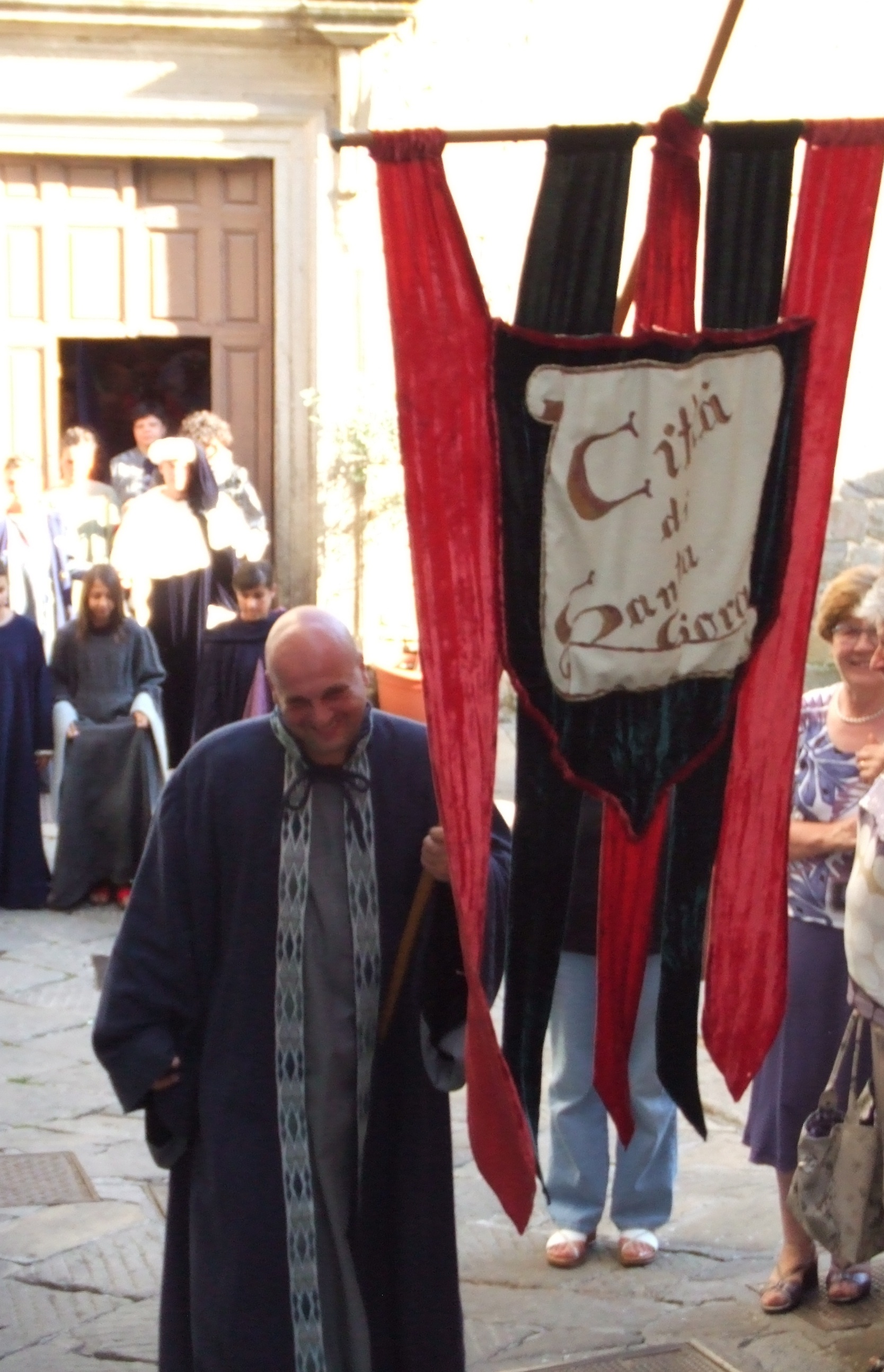 Gonfalonnier portant le gonfanon de Santa Fiora lors de la fête des saintes patronnes de la cité